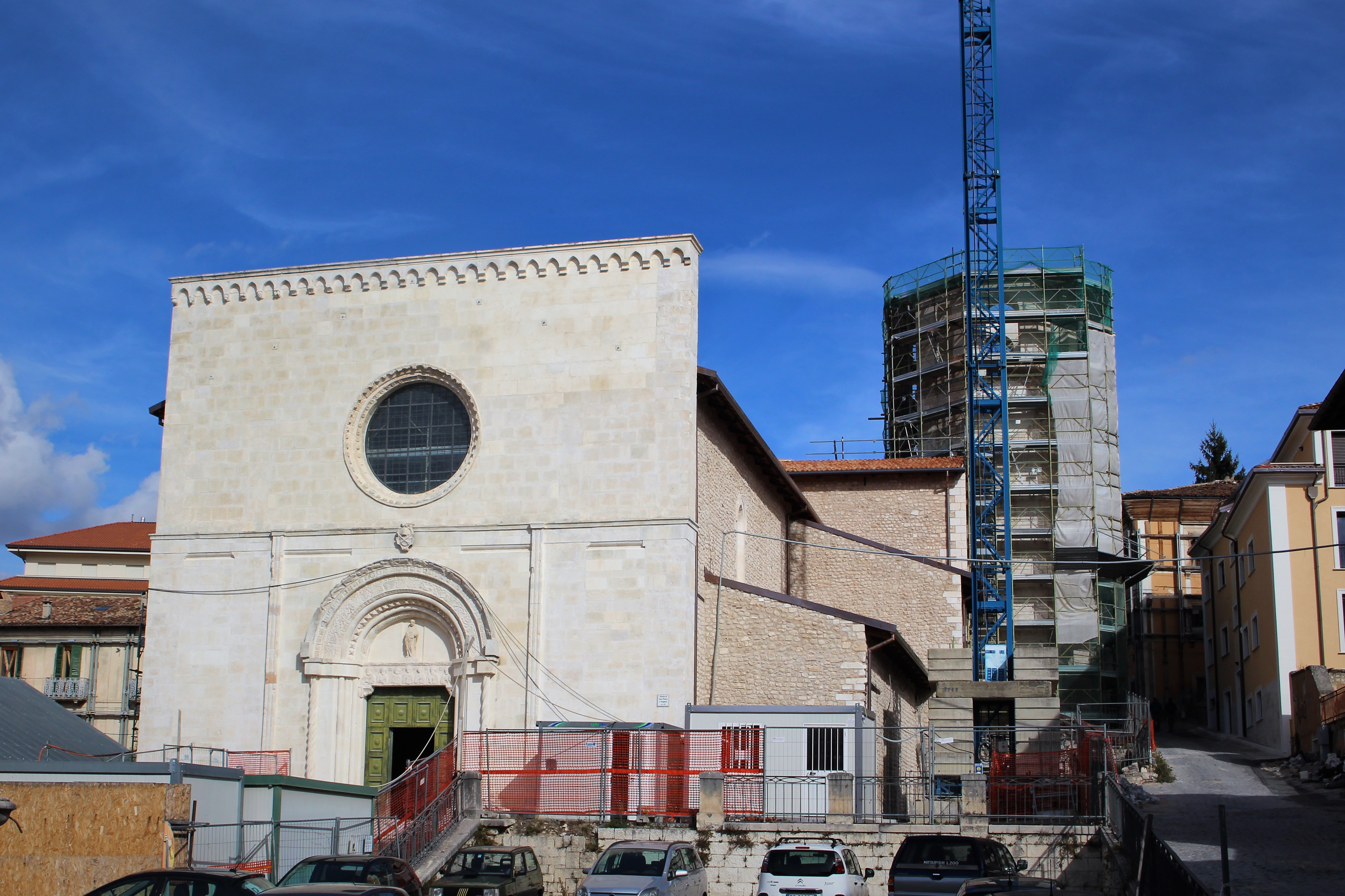 San Pietro nel 2017, durante i lavori di ristrutturazione post-sisma.